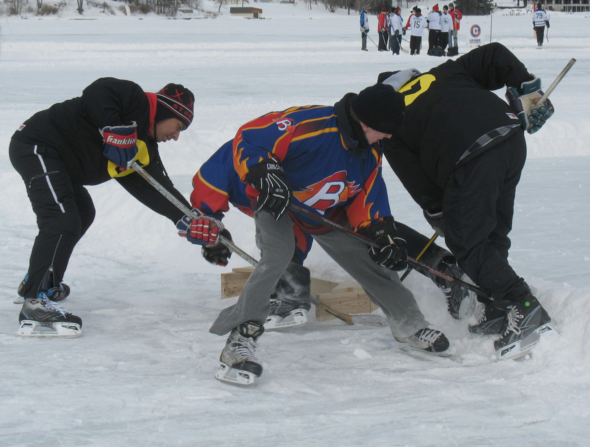 Pond Hockey Lac-Beauport, 6 février 2010. Capitale-Nationale, Province de Québec, Canada. Tournoi de hockey d'antan sur le lac Beauport comprenant 25 patinoires et 96 équipes.